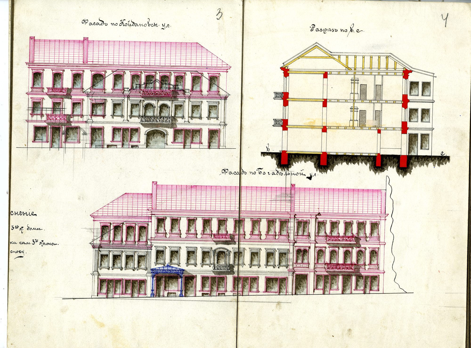 Беларуская (тарашкевіца): Менск (Miensk), рог вуліц Койданаўскай (vulica Kojdanaŭskaja) і Фэліцыянаўскай (vulica Felicyjanaŭskaja). Дом Гендэля